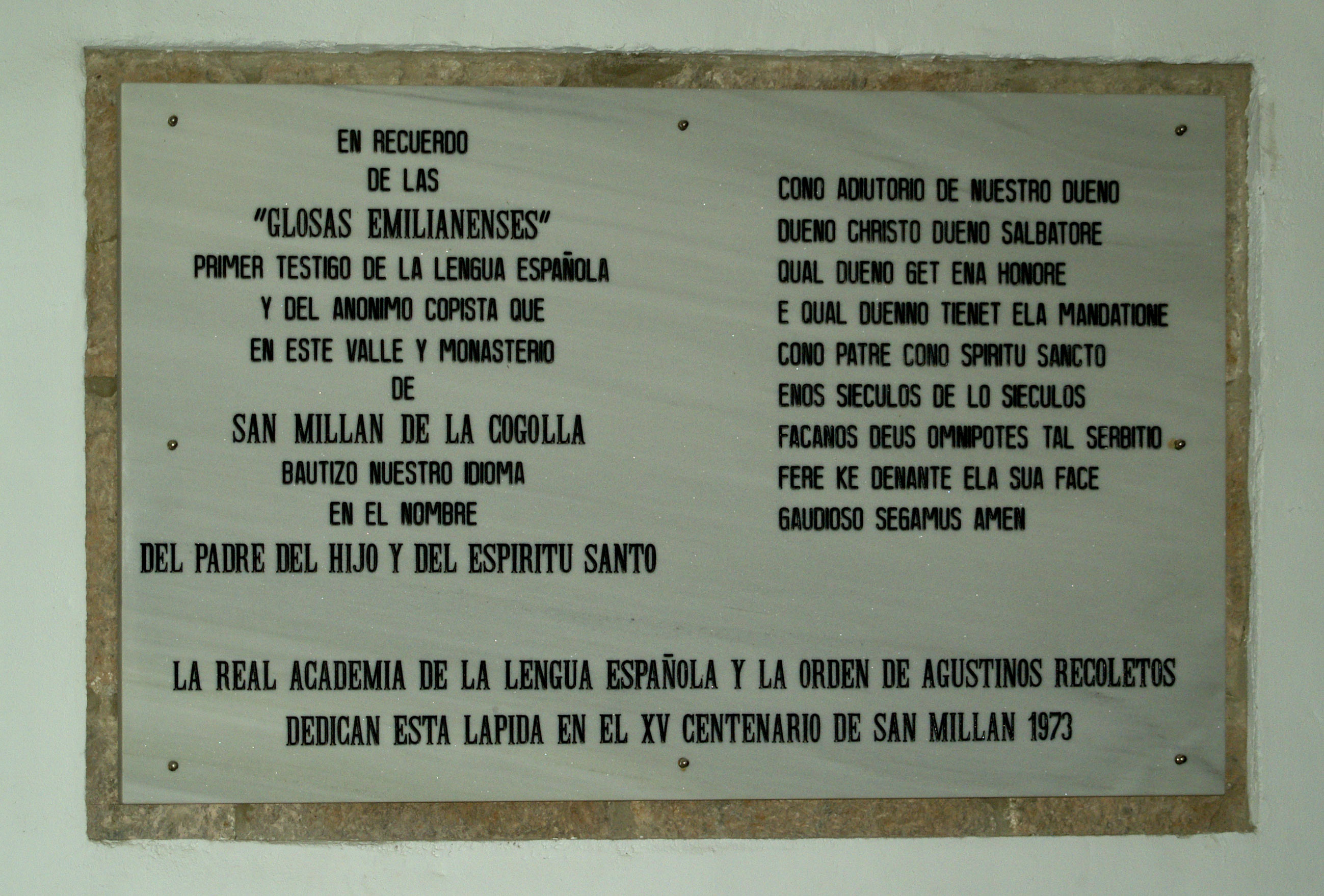 Homenaje al Milenario de la Lengua. Glosas Emilianenses. Monasterio de San Millán de Yuso